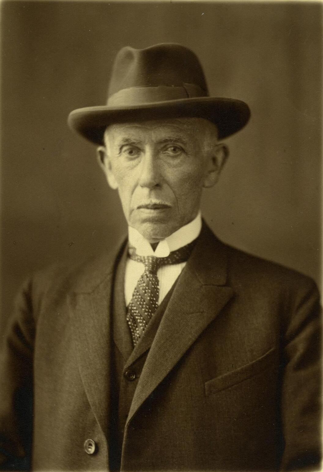 Portret van Harmannus Simon Kamminga (1850-1933), kunstmesthandelaar en fabrikant, stichter van het H.S. Kammingafonds in Groningen